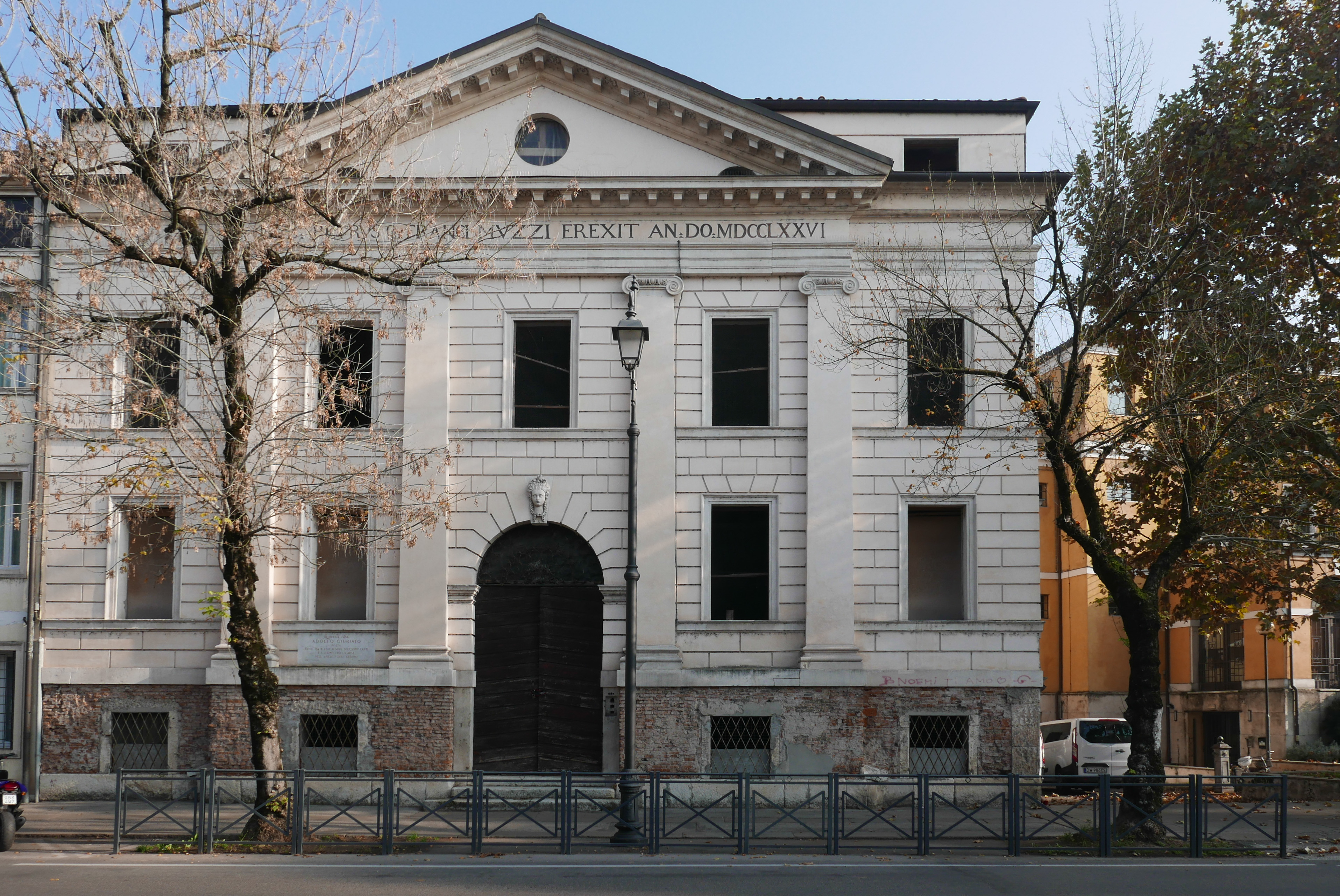 Facciata